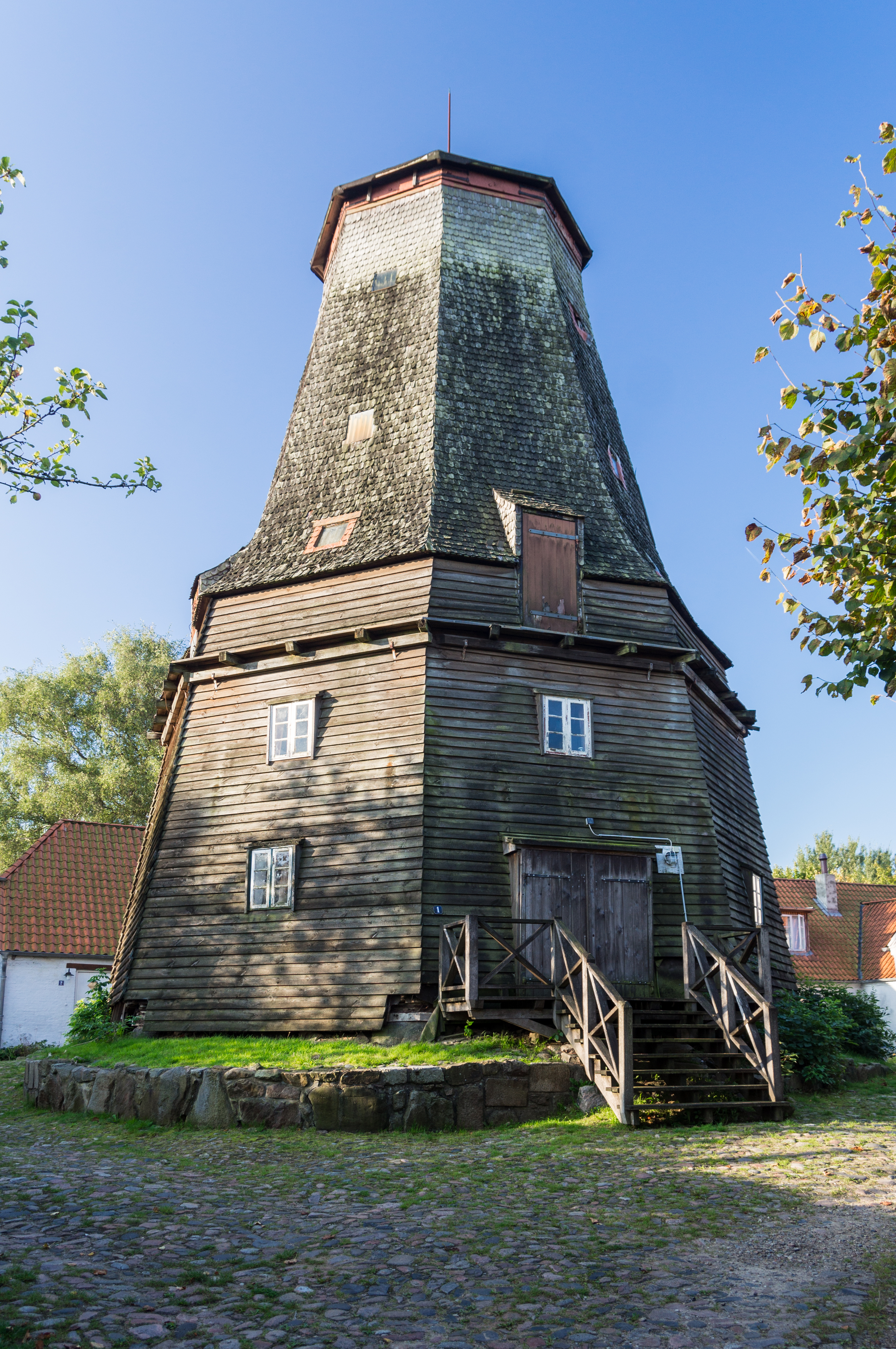 Flensburg-Sandberg, Zur Johannismühle, St. Johannis Mühle, Denkmal-Nr. 3.